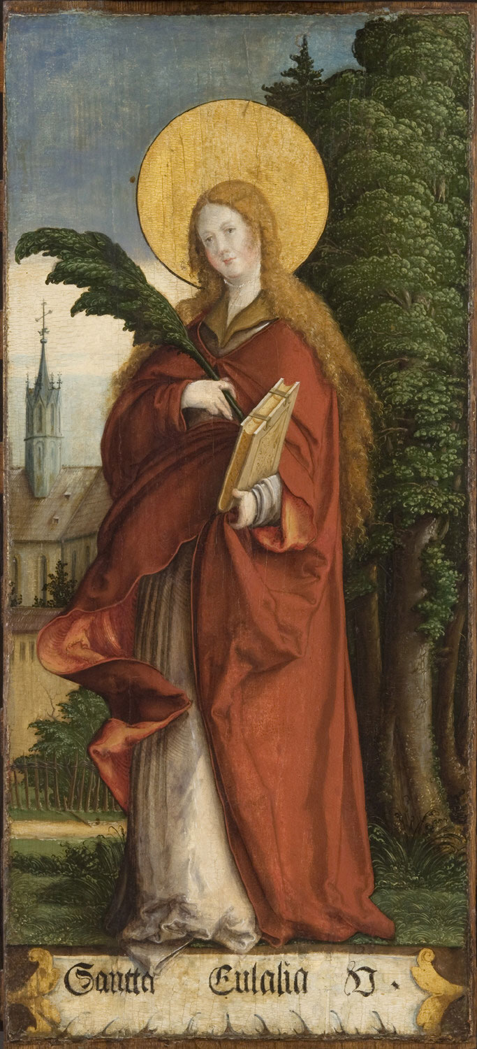 Ausstattung der ehemaligen Seitenaltäre der Meßkircher St. Martinskirche, Standflügel: Heilige Eulalia, als Märtyrerin mit Palme Eingescannt aus: Anna Moraht-Fromm und Hans Westhoff: Der Meister von Meßkirch – Forschungen zur südwestdeutschen Malerei des 16. Jahrhunderts, Ulm, 1997, S. 196, rechts